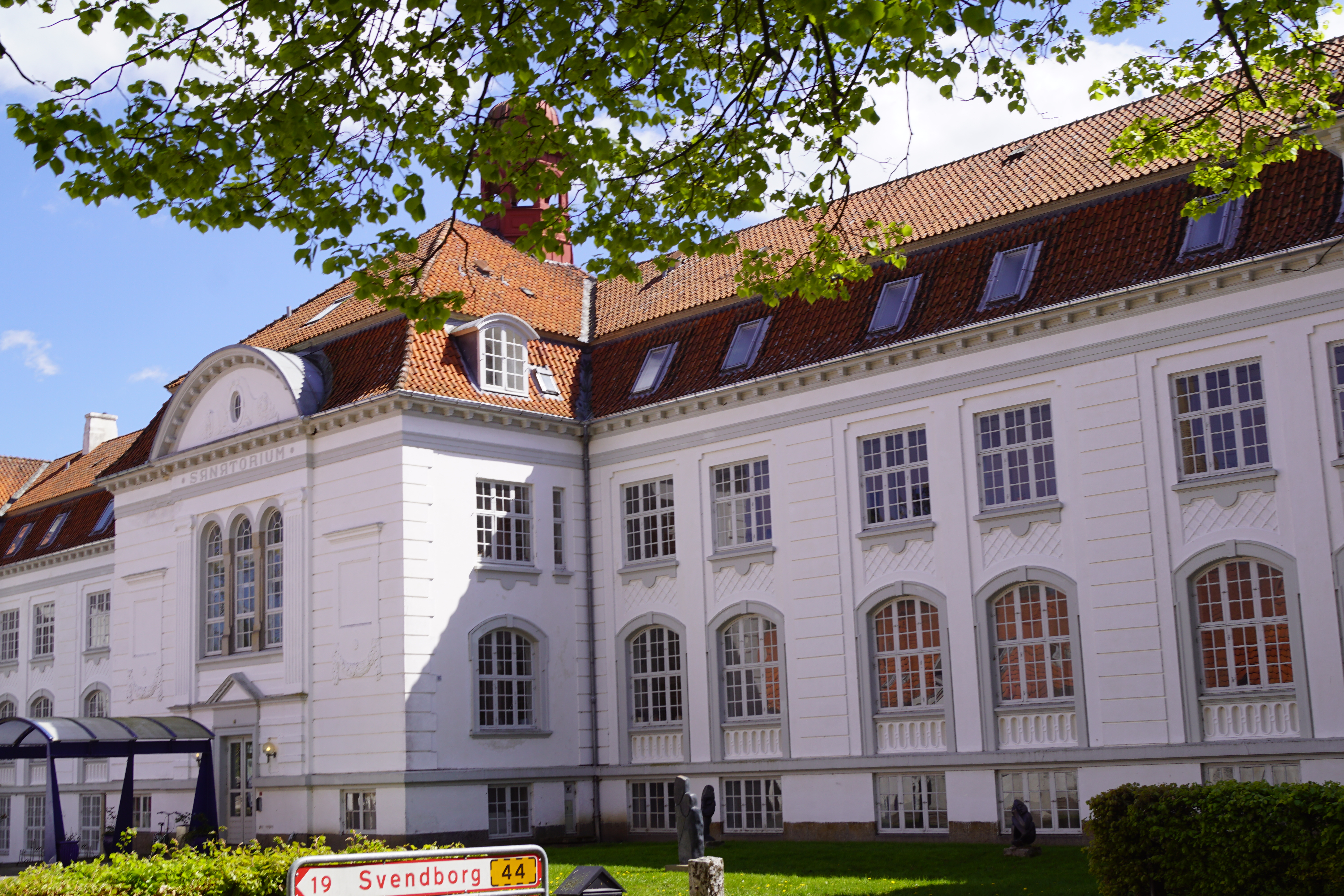 Nakkebølle Sanatorium ved Nakkebølle Fjord